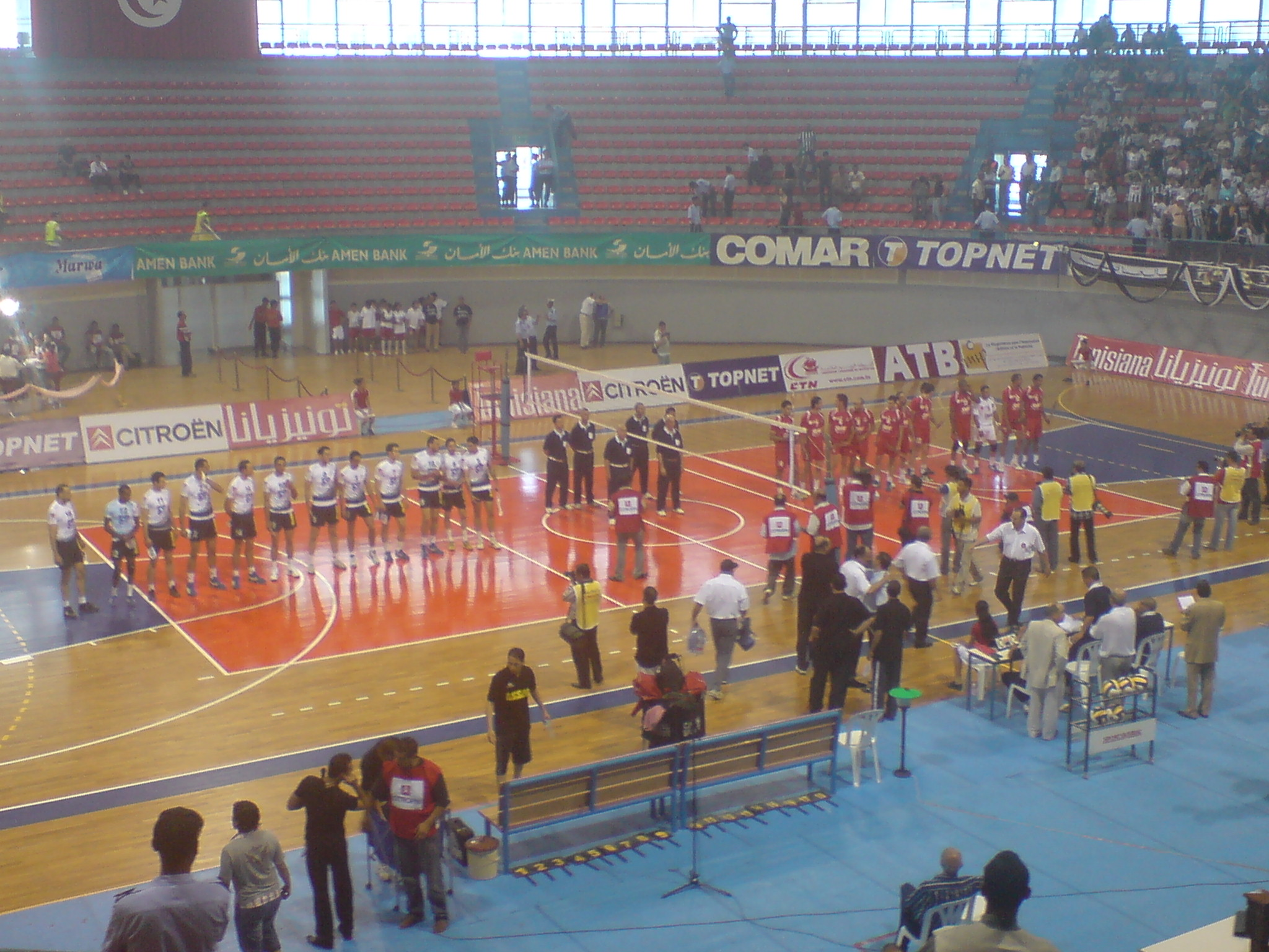 Présentation des équipes CSS et l'etoile en finale de la coupe de Tunisie de Volleyball de 2008. L'étoile a gagné par 3-1.